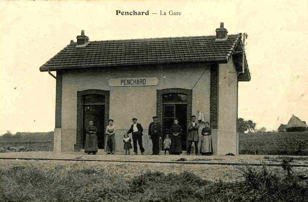 Le bâtiment-voyageurs de Penchard du tramway de Meaux à Dammartin. Les préparatifs pour l'adjonction de l'étage ont commencé en juillet 1914, la photo a donc été prise avant cette date.